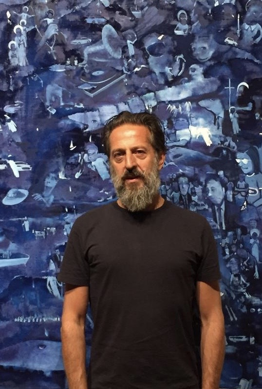 Daniele Galliano all'Istituto italiano di cultura di Città del Messico